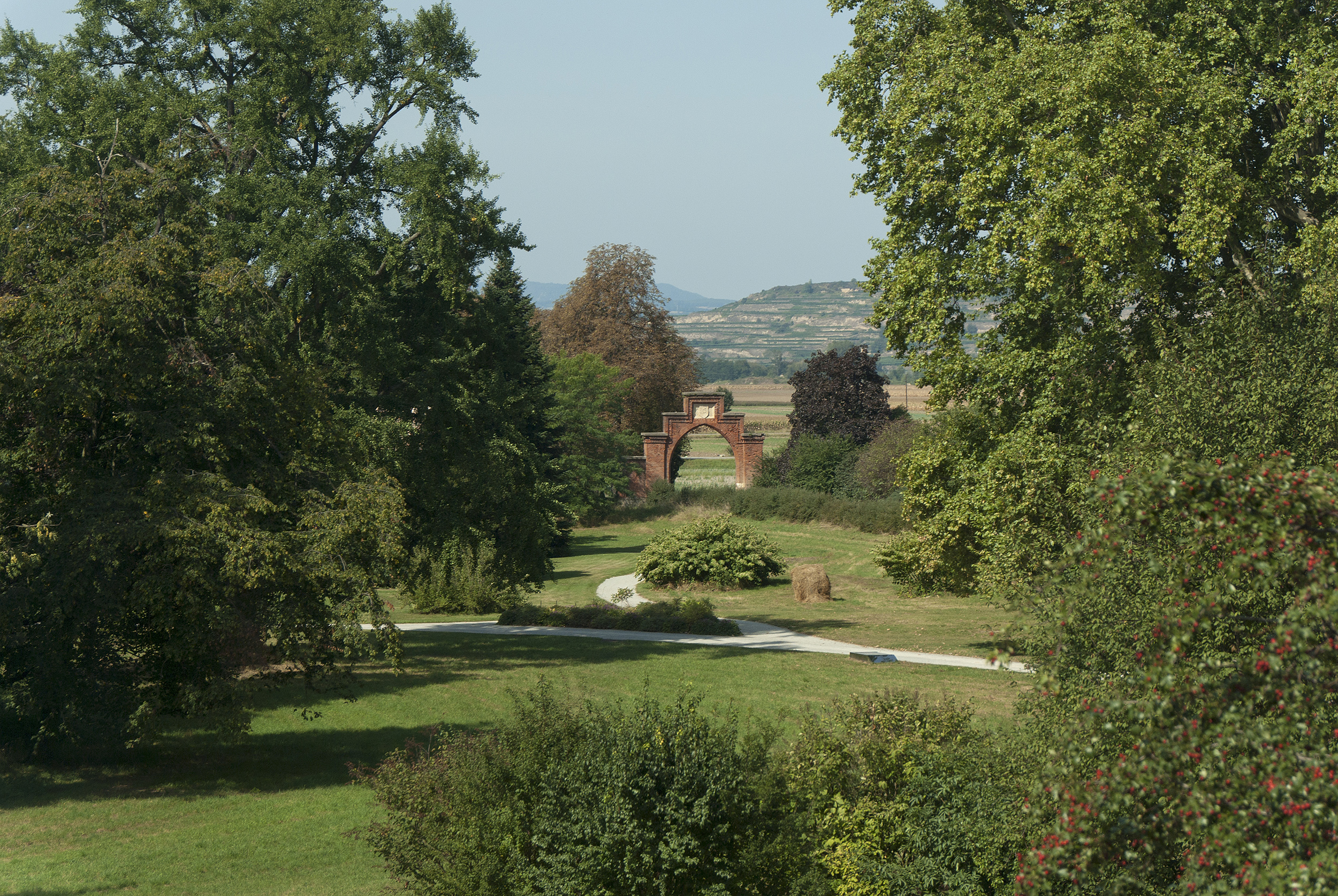 Grafenegg – Schloss und Landschaftsgarten Dieses Bild wurde anlässlich des österreichischen Tags des Denkmals 2014 in Niederösterreich eingereicht.